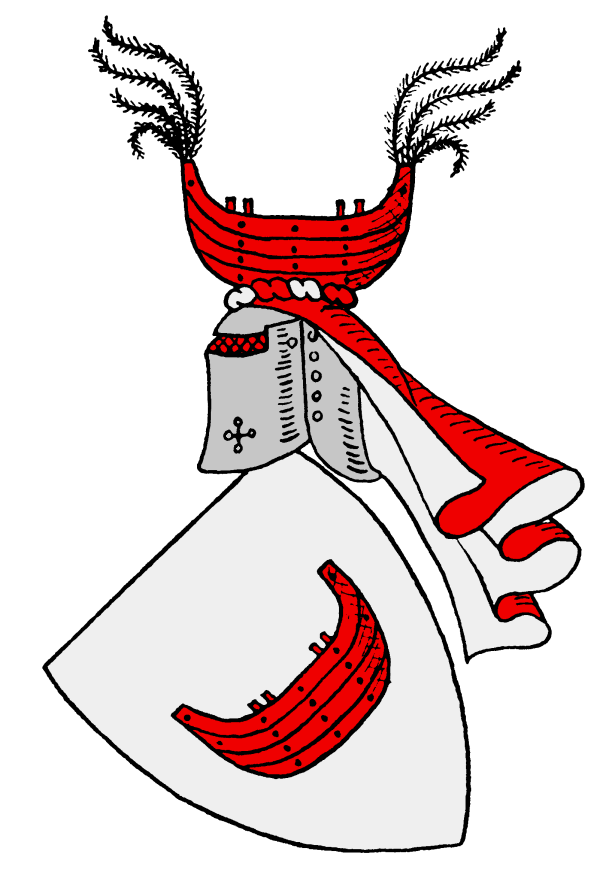 Wappen der Familie von Both.